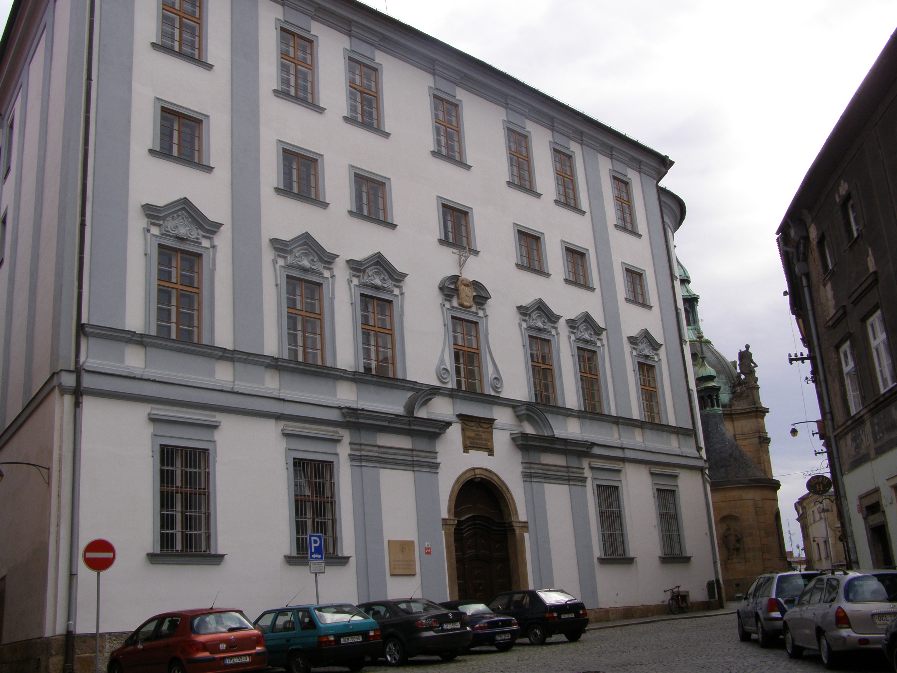 Budova Cyrilometodějské teologické fakulty Univerzity Palackého v Olomouci